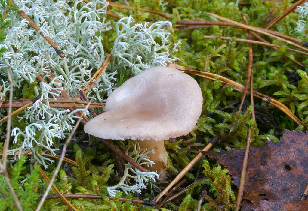 Lactarius trivialis